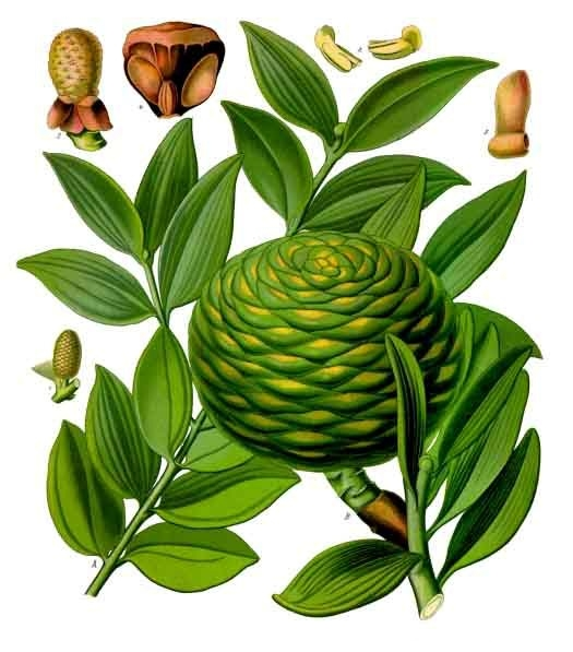 Dammarabaum. A Blattzweig und B Frucht in natürl. Grösse; 1 männliche Blüthenähre, desgl.; 2 Staubblätter, vergrössert; 3 Fruchtspindel, natürl. Grösse; 4 Deckschuppe mit Fruchtschuppe und Samen, desgl.; 5 Same mit Flügel, vergrössert.